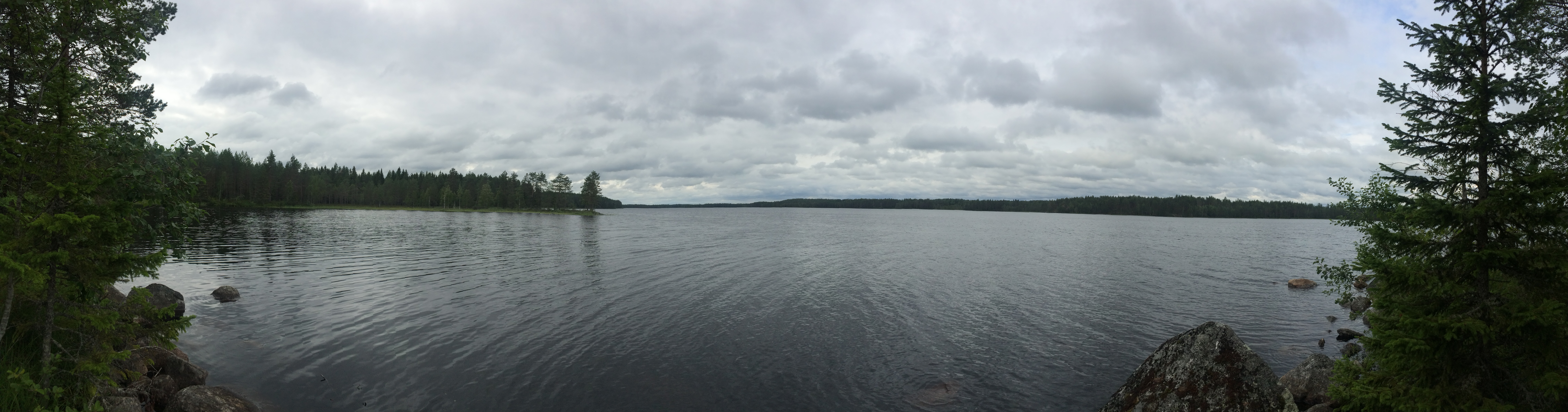 Колосенъярви